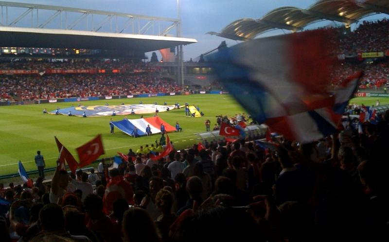 Match amical de l'équipe de France de football, au stade Gerland à Lyon, contre la Turquie (résultat final : 1-0 pour la France, but sur penalty de Karim Benzema).